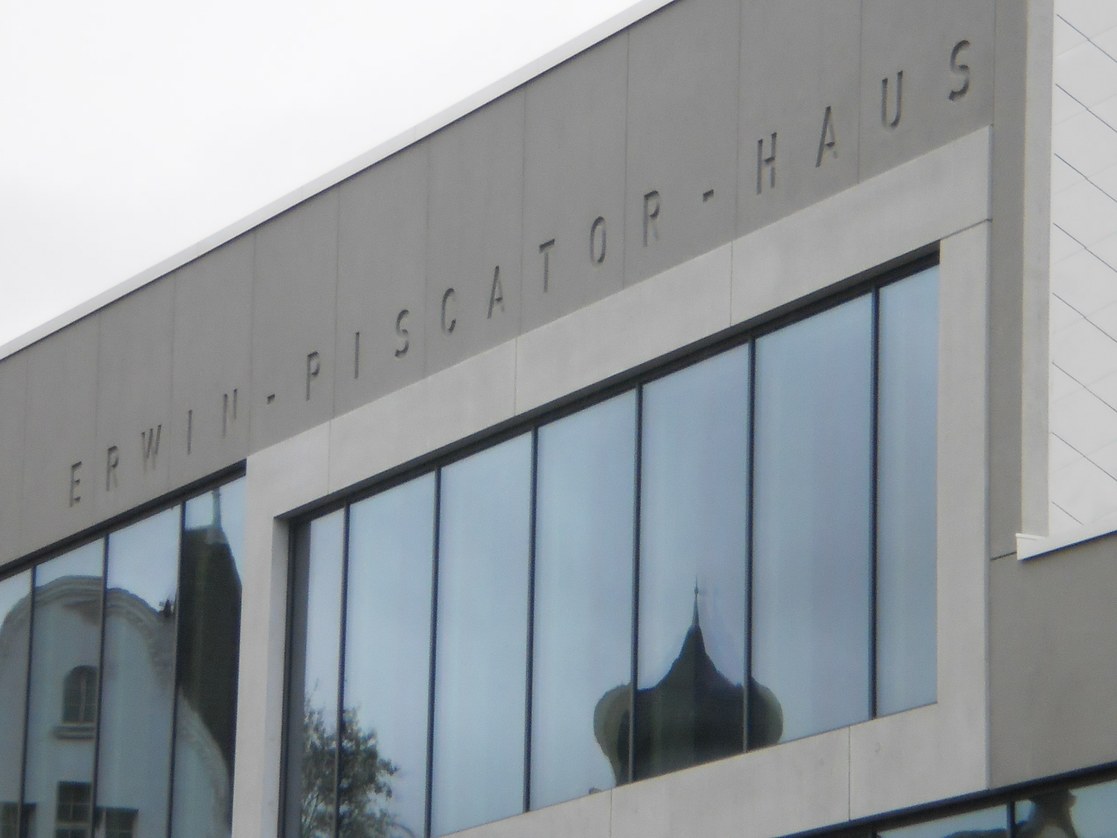 Das Erwin-Piscator-Haus (Stadthalle) mit Spiegelung der Häuser in der Biegenstraße in Marburg zum Ende der Bauarbeiten im November 2015.